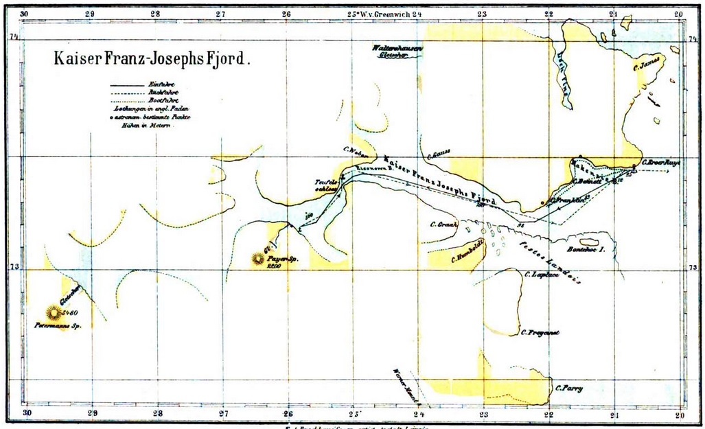 Kartenskizze des Kaiser-Franz-Josef-Fjord in Ostgrönland von der 2. Deutschen Nordpolar-Expedition